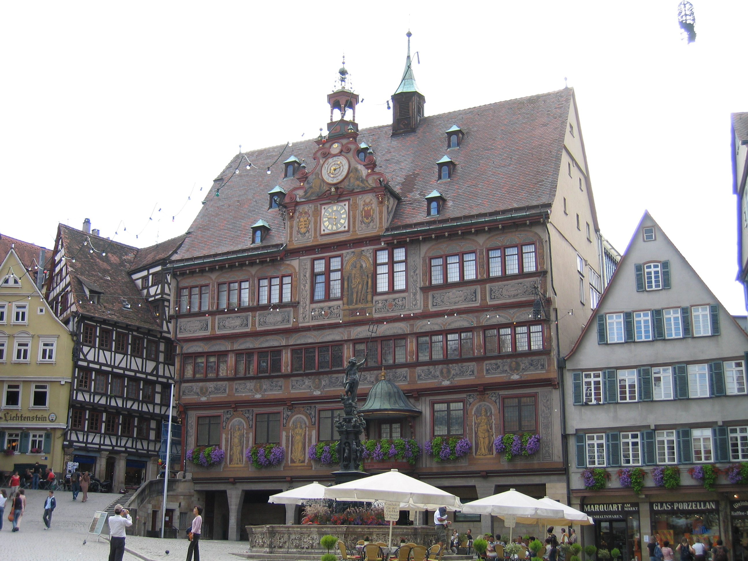 Tuebingen Rathaus Juli 2007